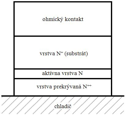 Rez vrstvovej štruktúry Gunnovej diódy